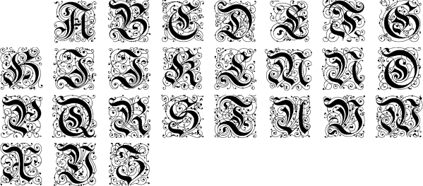 Beispiel für Initialen